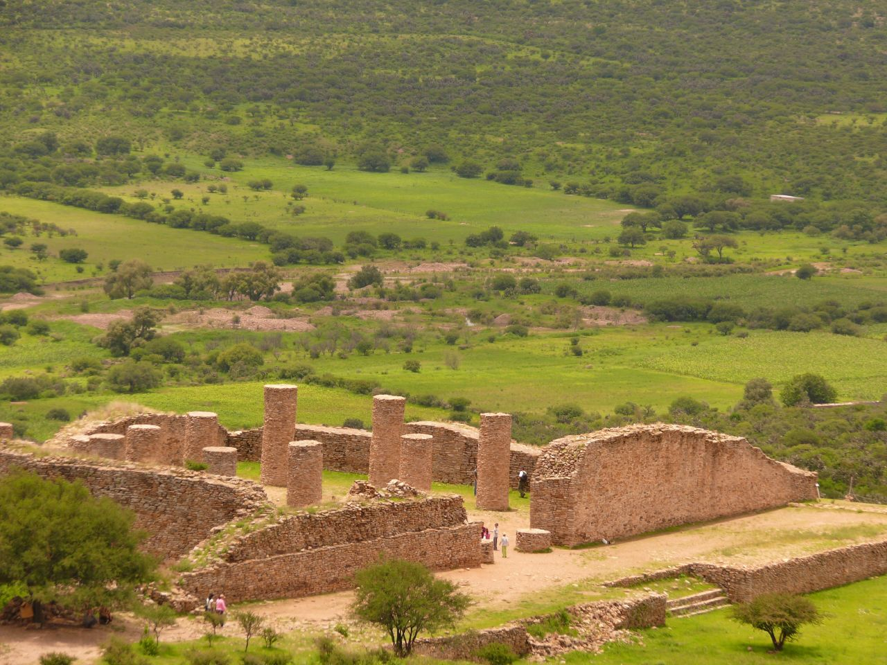 Salón de las Columnas in La Quemada, Zacatecas